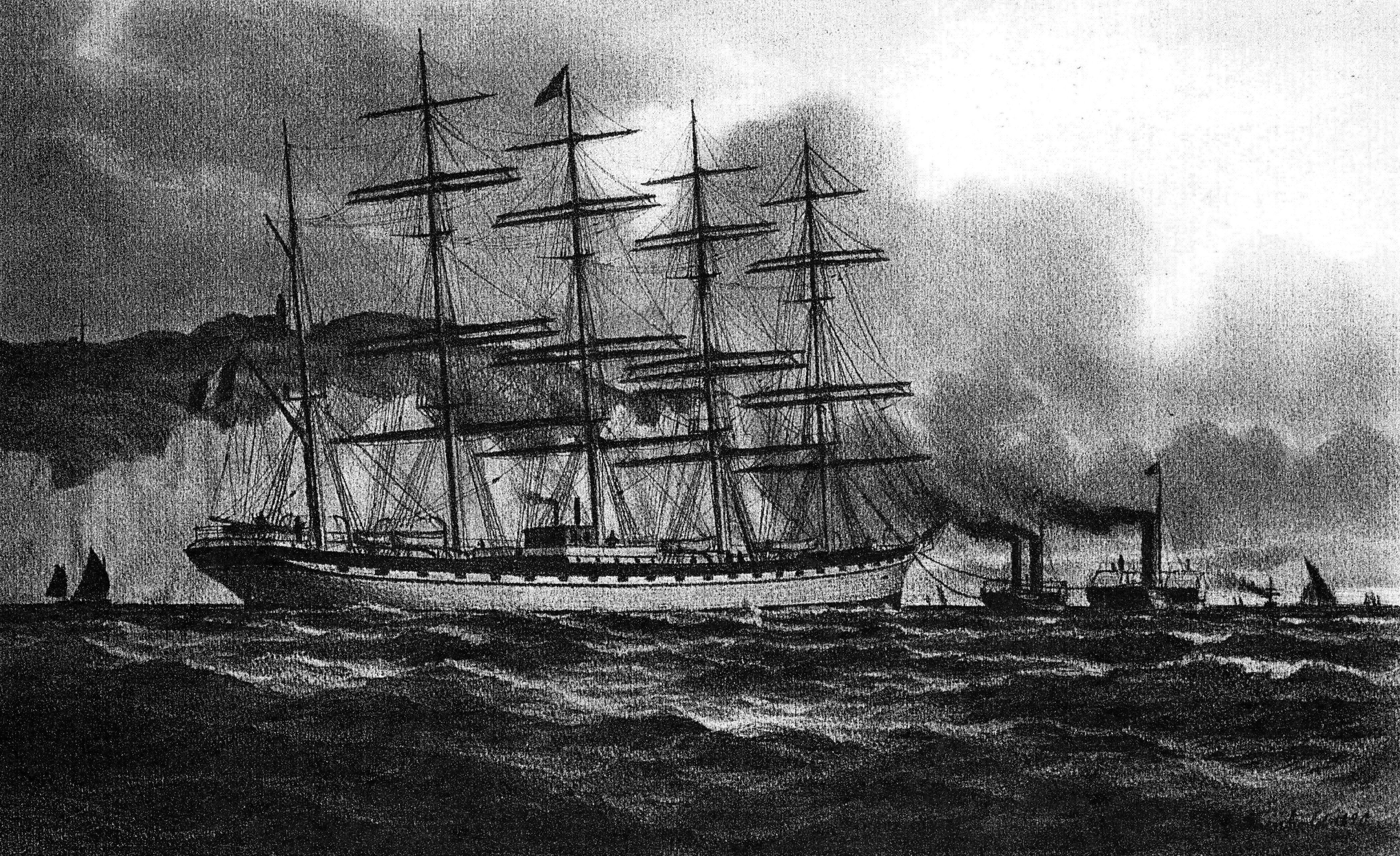 Französisches Fünfmastsegelschiff FRANCE 1890. Gemälde von Lüder Arenhold 1891